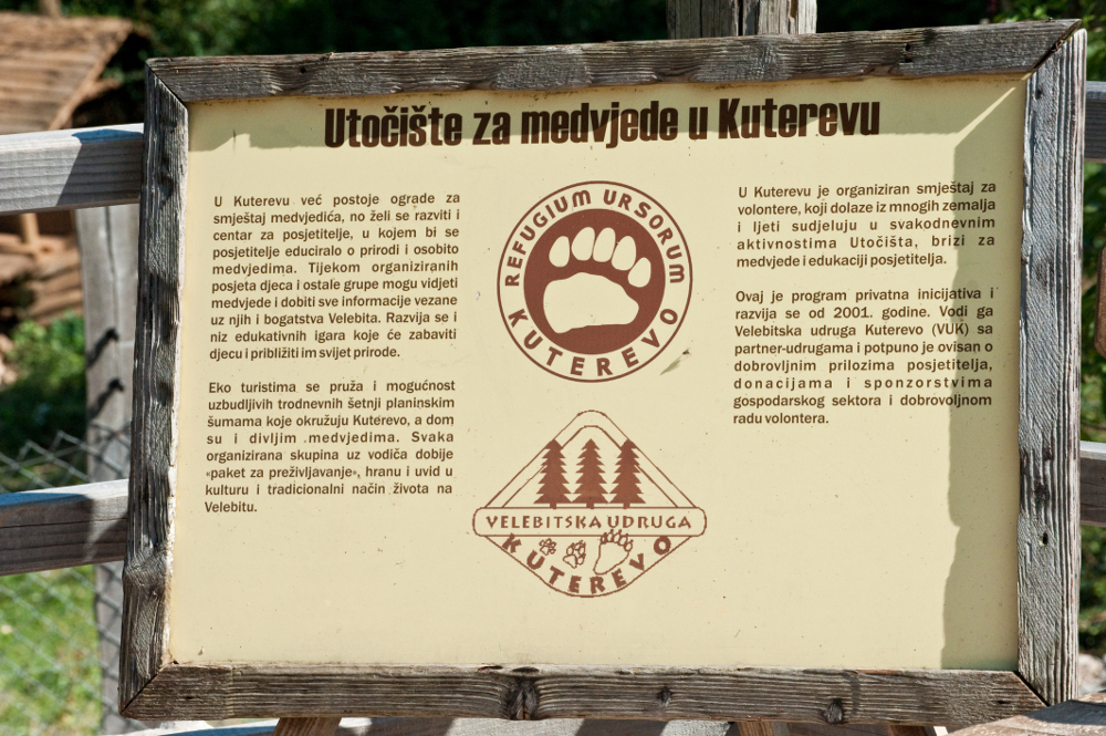 Utočište za medvjediće Kuterevo